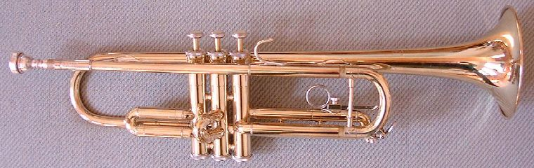 Trompette en UT - pas de copyright, utilisation gratuite illimitée (for unlimited free use) : recadrée pour Wikipedia Catégorie:Instrument à vent de la famille des cuivres